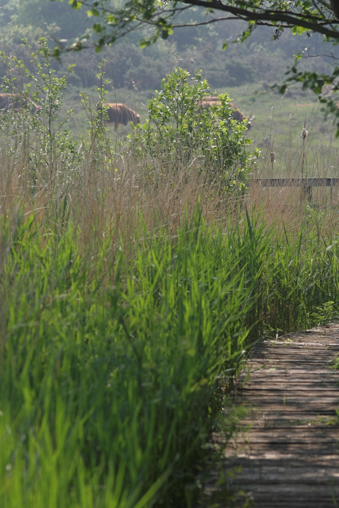 Platelage dans le marais acido-alcalin